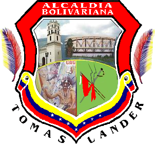 Escudo del municipio Lander. Estado Miranda. Venezuela